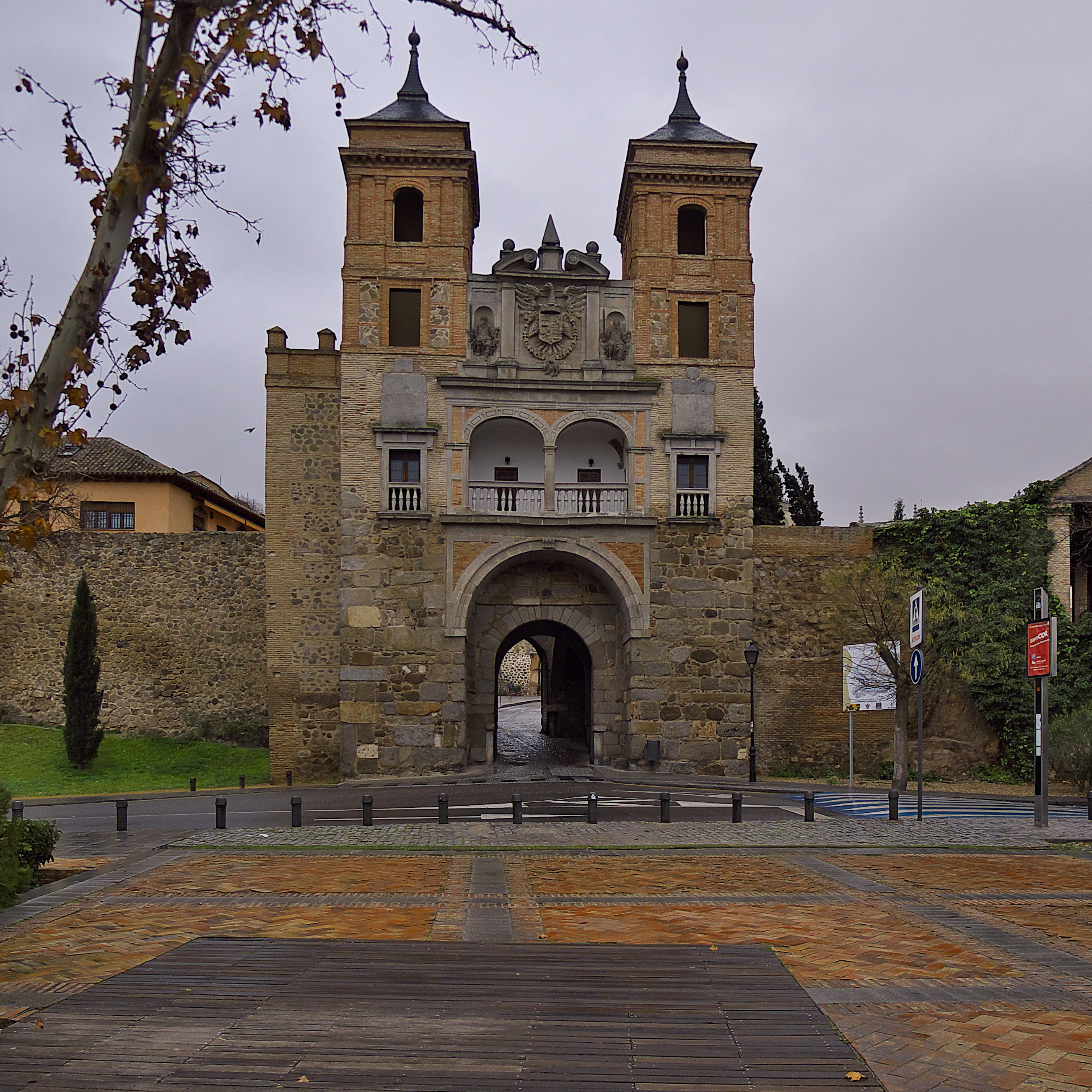 En este lugar existía la puerta musulmana de Bab-al-Yahud y en 1576 se edifica en honor a Felipe II.